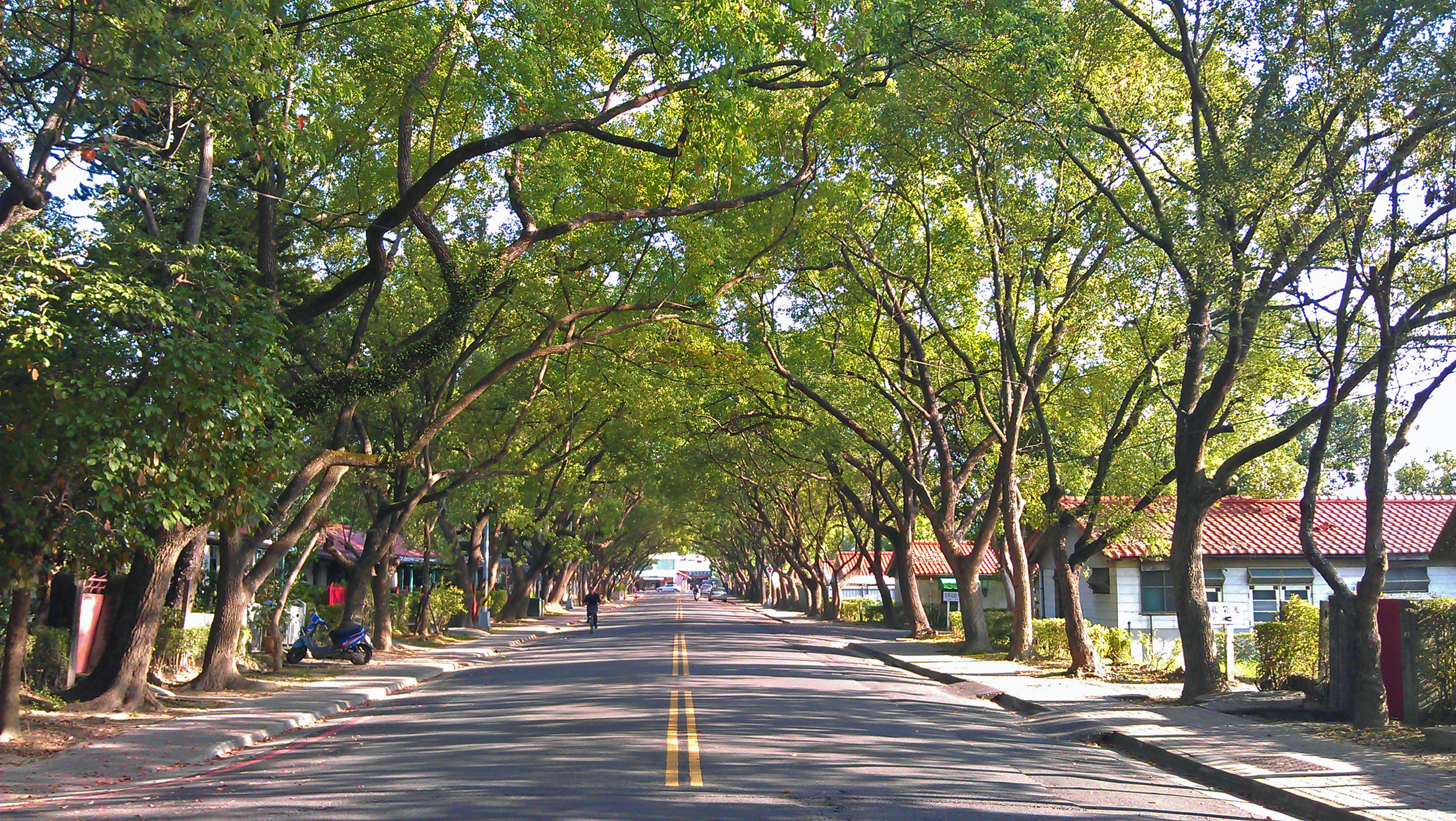 中興新村街景